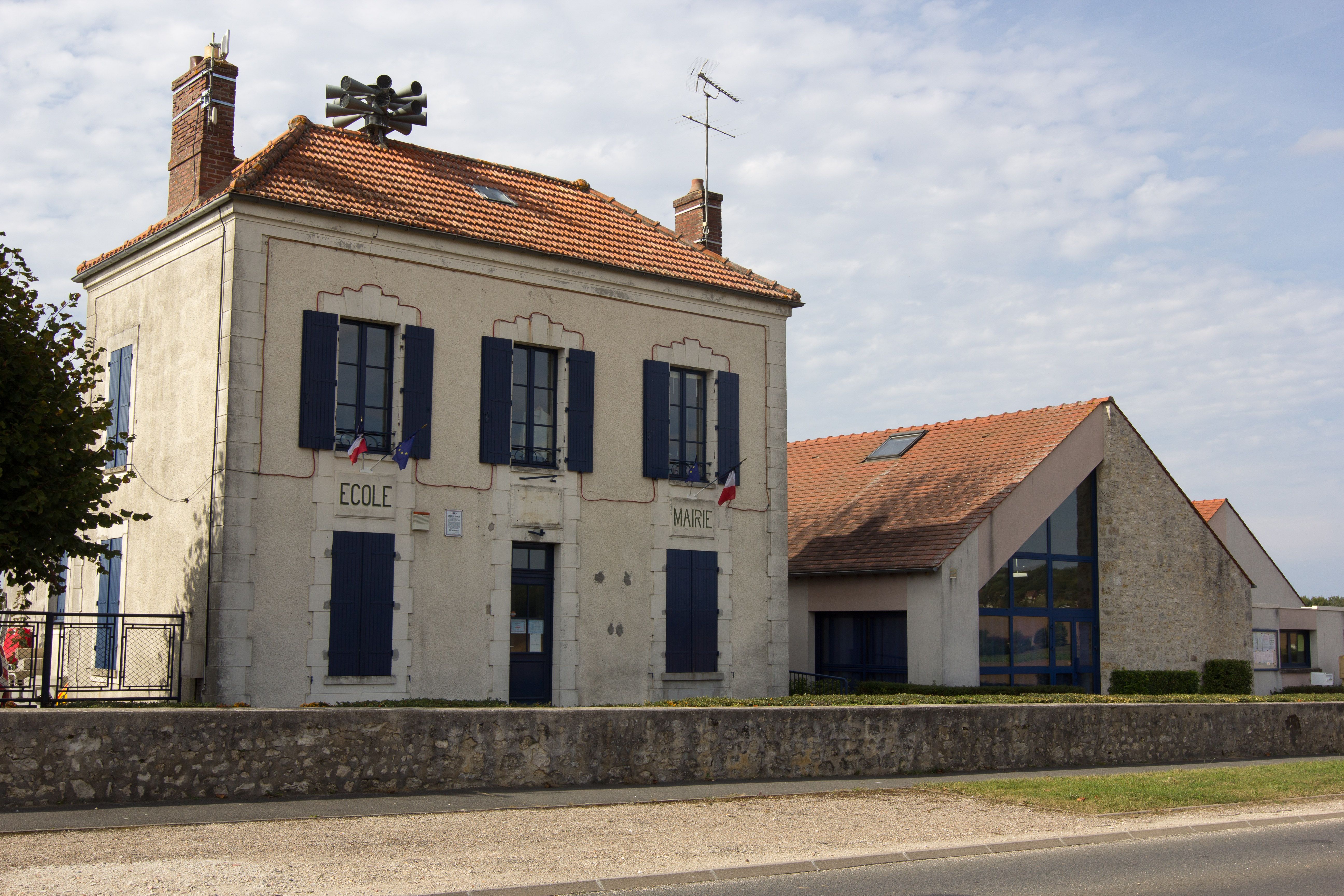 Hotel de ville de Guigneville-sur-Essonne / Guigneville-sur-Essonne / Essonne / France